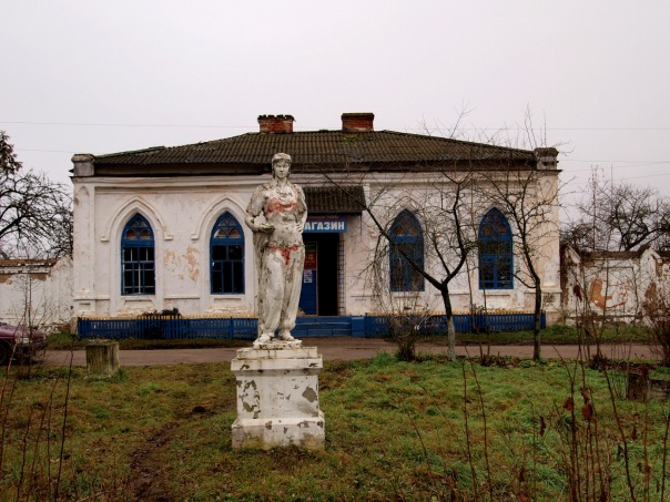 Беларуская (тарашкевіца): Будынак былой паштовай станцыі. пас. Грышаны This is a photo of Belarusian heritage monument. Reference number: 213Г000131 ( WLM)